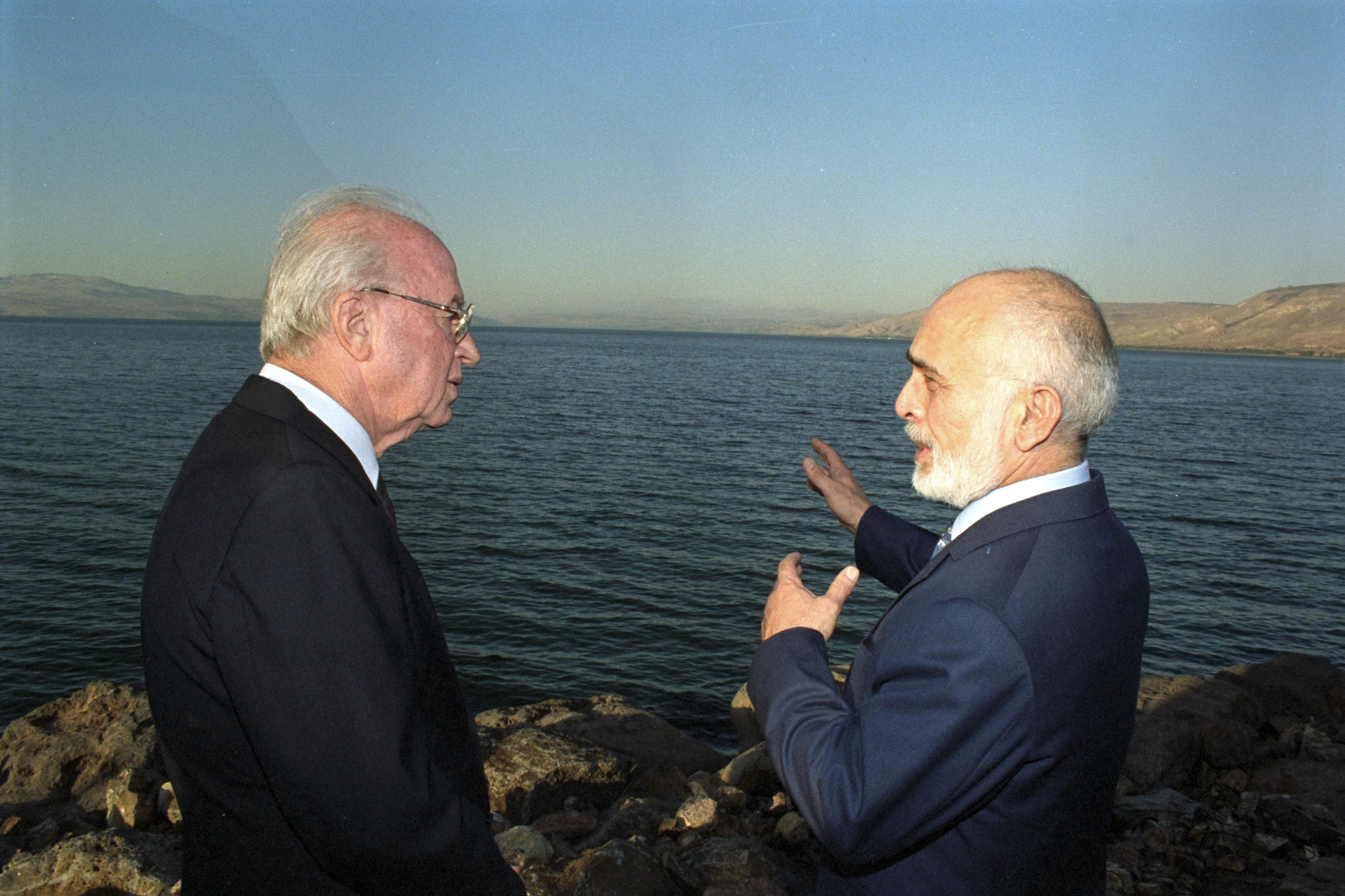 Israeli Prime Minister Yitzhak Rabin and King Hussein of Jordan confer on the Sea of Galilee shore after signing the Israel Jordan peace treaty. ראש הממשלה יצחק רבין וחוסיין מלך ירדן משוחחים ביניהם לחוף ים כינרת לאחר טקס אישרור חוזה השלום הישראלי ירדני בבית גבריאל בצמח. Photo: SAAR YAACOV: GPO, 10/11/1994.